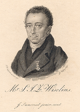 S.I. Wiselius in 1815, nadat hij was geridderd. Publiek domein